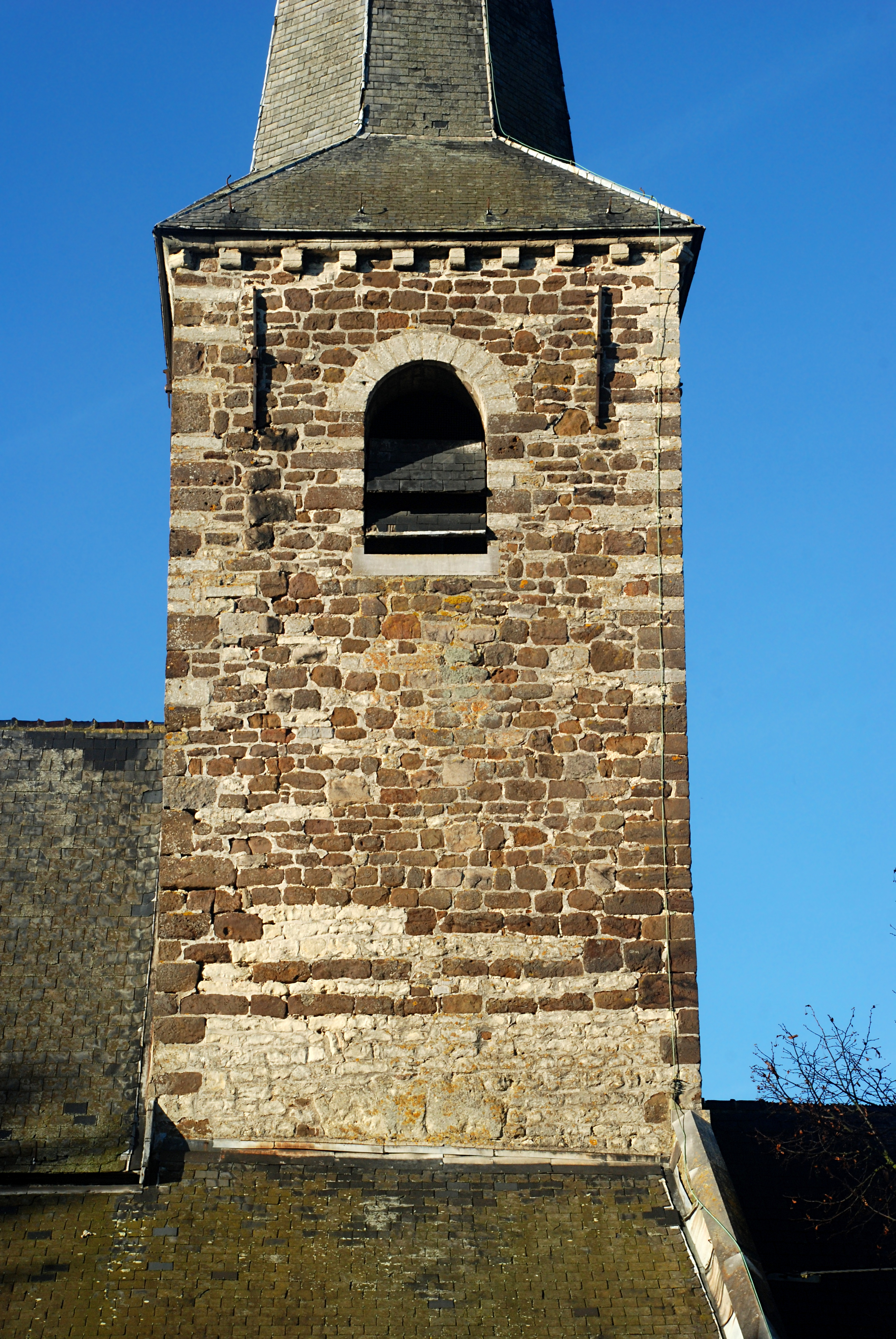 Belgique - Brabant wallon - Chaumont-Gistoux - Église Saint-Bavon de Chaumont